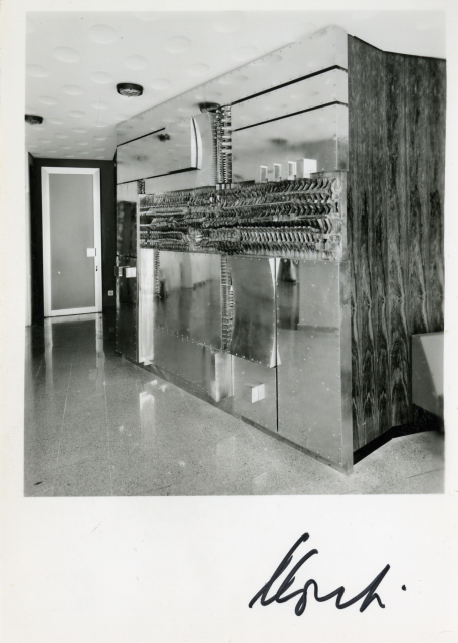 Milano. Via Andrea Costa, 17. Atrio Rank-Xerox. Arnaldo Pomodoro, "La vera perla dei lucidi", ferro, ottone e idronalis, 1960. Servizio fotografico : Milano, 1965 / Paolo Monti. - Fototipi: 6 : Positivo b/n, gelatina bromuro d'argento/ carta, provino a contatto da pellicola 10x12. - ((Al verso delle stampe manoscritti i numeri dei negativi corrispondenti: 10558, 10559, 10560, 10561, 10562, 10563; iscrizioni documentarie manoscritte a penna; al recto firma autografa a pennarello nero. - La suddetta serie è contenuta nella scatola dei contatti identificata con il n. 09; sul coperchio iscrizione didascalica manoscritta a pennarello nero: "Contatti/ Architet.". - Occasione: Documentazione dell'opera di Arnaldo Pomodoro. - Fonte: Monografia di Ballo, Guido: Dalla poetica del segno alla presenza continua: Arnaldo e Giò Pomodoro, Milano, Luigi Maestri Editore (1962). - Fonte: Monografia: Arnaldo Pomodoro, catalogo della mostra, Roma 1965, Roma, Tip. Christen (1965). Catalogo della mostra: febbraio-marzo 1965, Marlborough Galleria d'arte, Roma, Marlborough Fine art, Londra, Marlborough Gerson gallery, New York. - Fonte: Fattura di Paolo Monti: IV. Commesse/ Fattura/ Arnaldo Pomodoro (1968/01/15), presso Archivio Paolo Monti. 6 ingrandimenti 30x40 per album foto 10558-63; 12 ingrandimenti 24x30 foto 10558/559/60/61/62/63. - Fonte: Agenda di Paolo Monti: Monti/ 2/ 6 giugno 1964 - 31 marzo 1966/ 8194-12420 (1964-1966), presso Archivio Paolo Monti. - Fonte: Fattura di Paolo Monti: IV. Commesse/ Fattura/ Scultura Arnaldo Pomodoro atrio Rank Xerox - Milano (1968/01/15), presso Archivio Paolo Monti. 6 riprese 10x12 foto n. 10558/10559/10560/10561/10562/10563; 4 riprese principali in b/n Linhoff 10x12, 2 varianti delle stesse, 3 fotocolor 10x12 a luce artificiale.